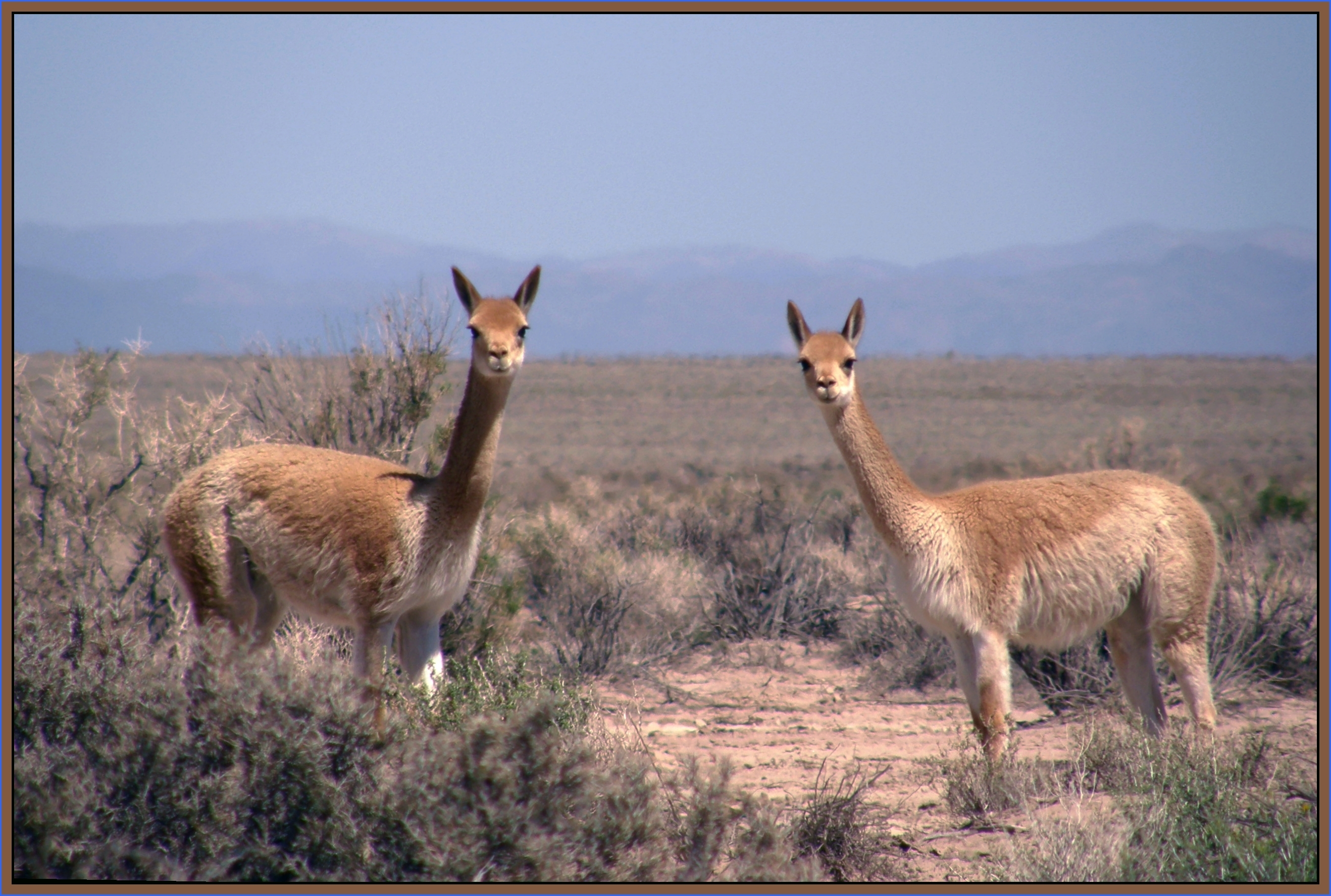 Vigognes (Vicugna vicugna), photo prise sur la RD 38 au nord de San Antonio de los Cobres, province de Salta, Argentine